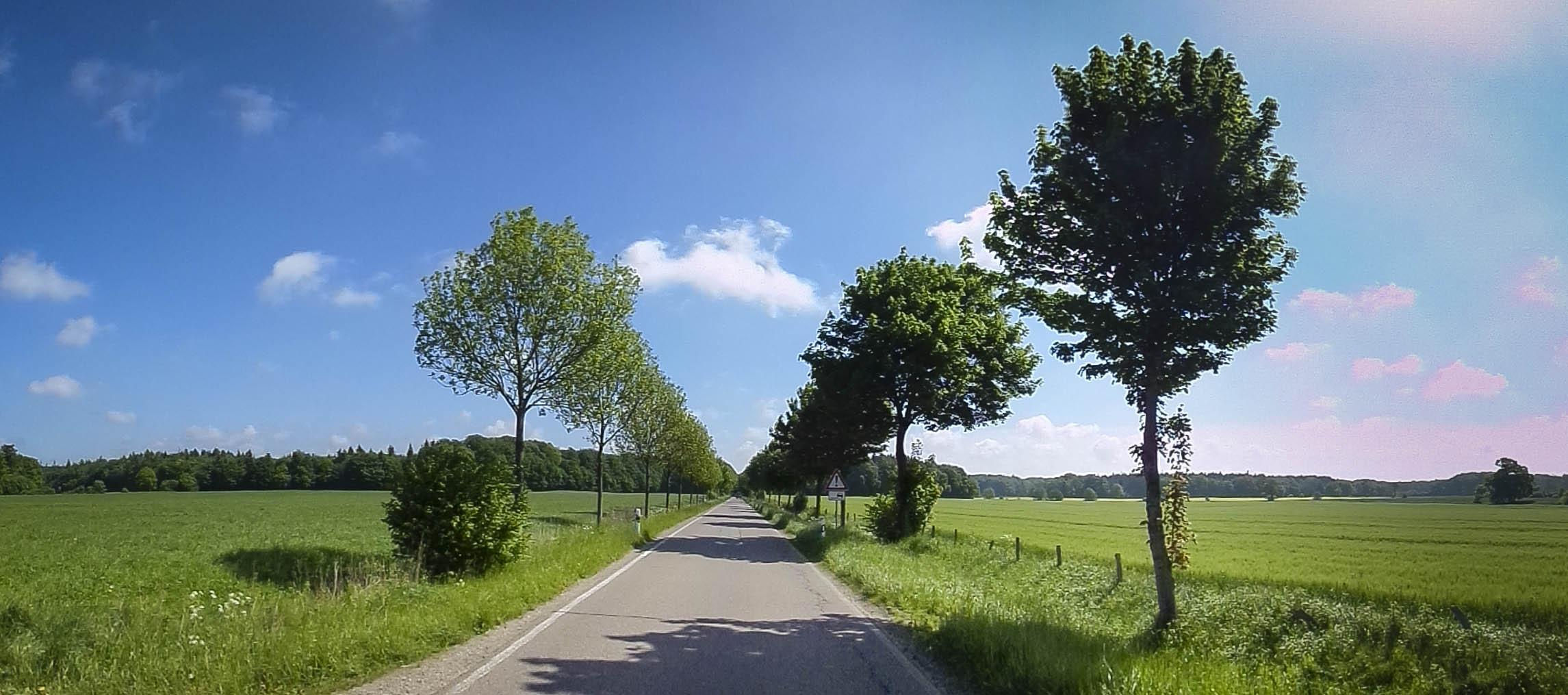 Bönebütteler Damm